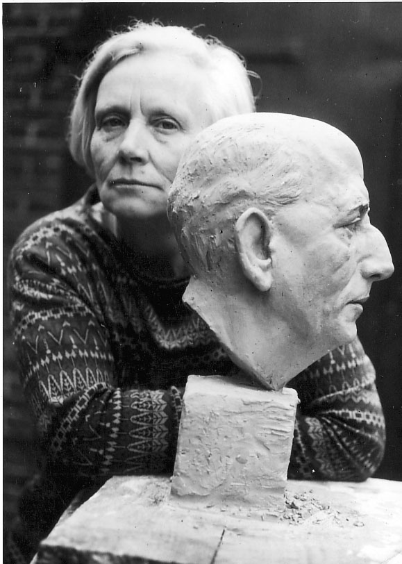 Jutta Bossard-Krull mit einer Büste von Walter Ahrens, Blankenese © Kunststätte Bossard